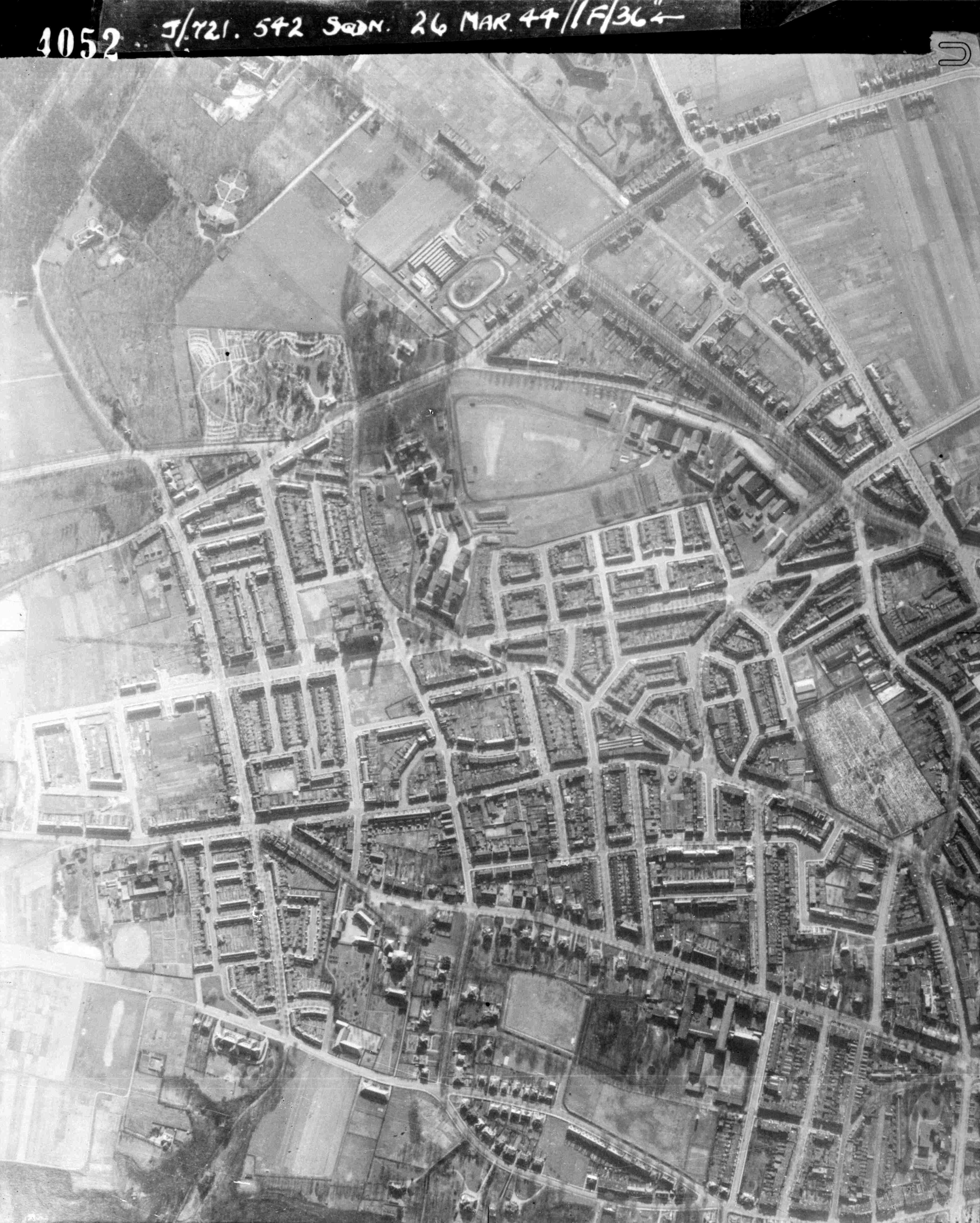 Dit is een luchtfoto van Nijmegen-Oost, linksonder is het Kops Plateau, rechtsboven het Galgenveld, linksboven het Marienbosch; het noorden is onder.